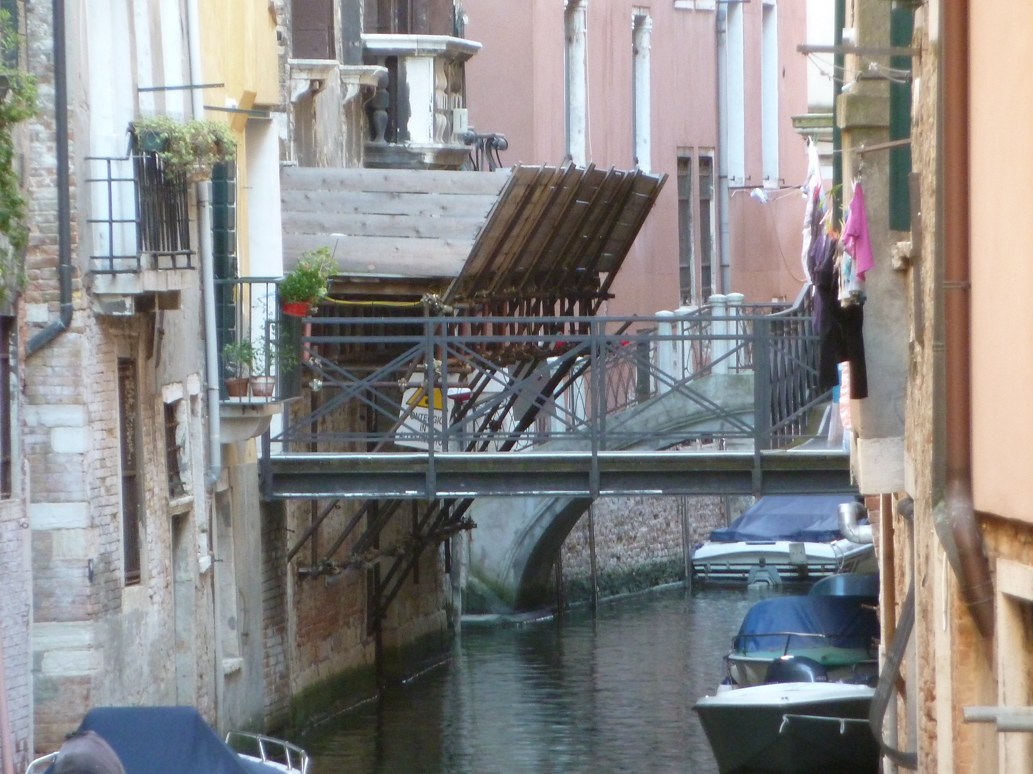 Rio San Giovanni Crisostomo (Venice)